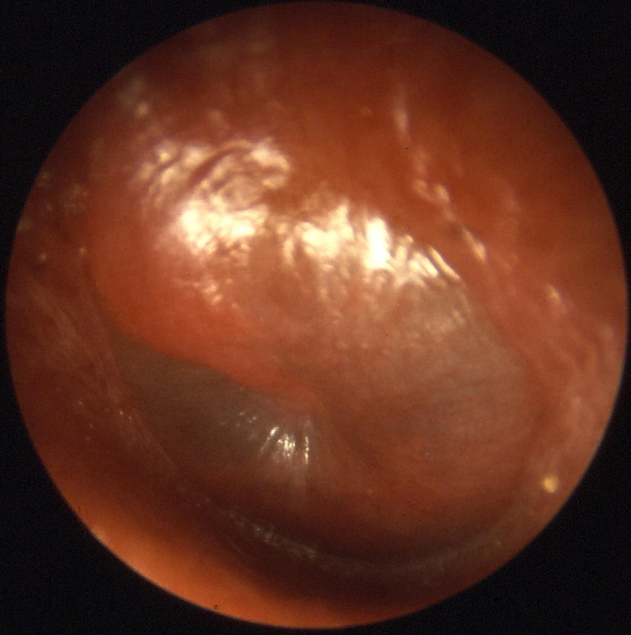 Otitis media acuta - Entdifferenzierung